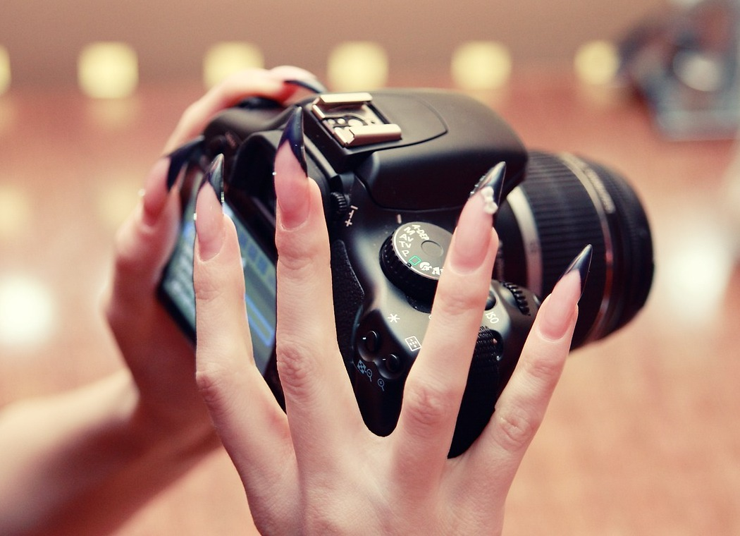 Отдал старого друга в добрые руки...